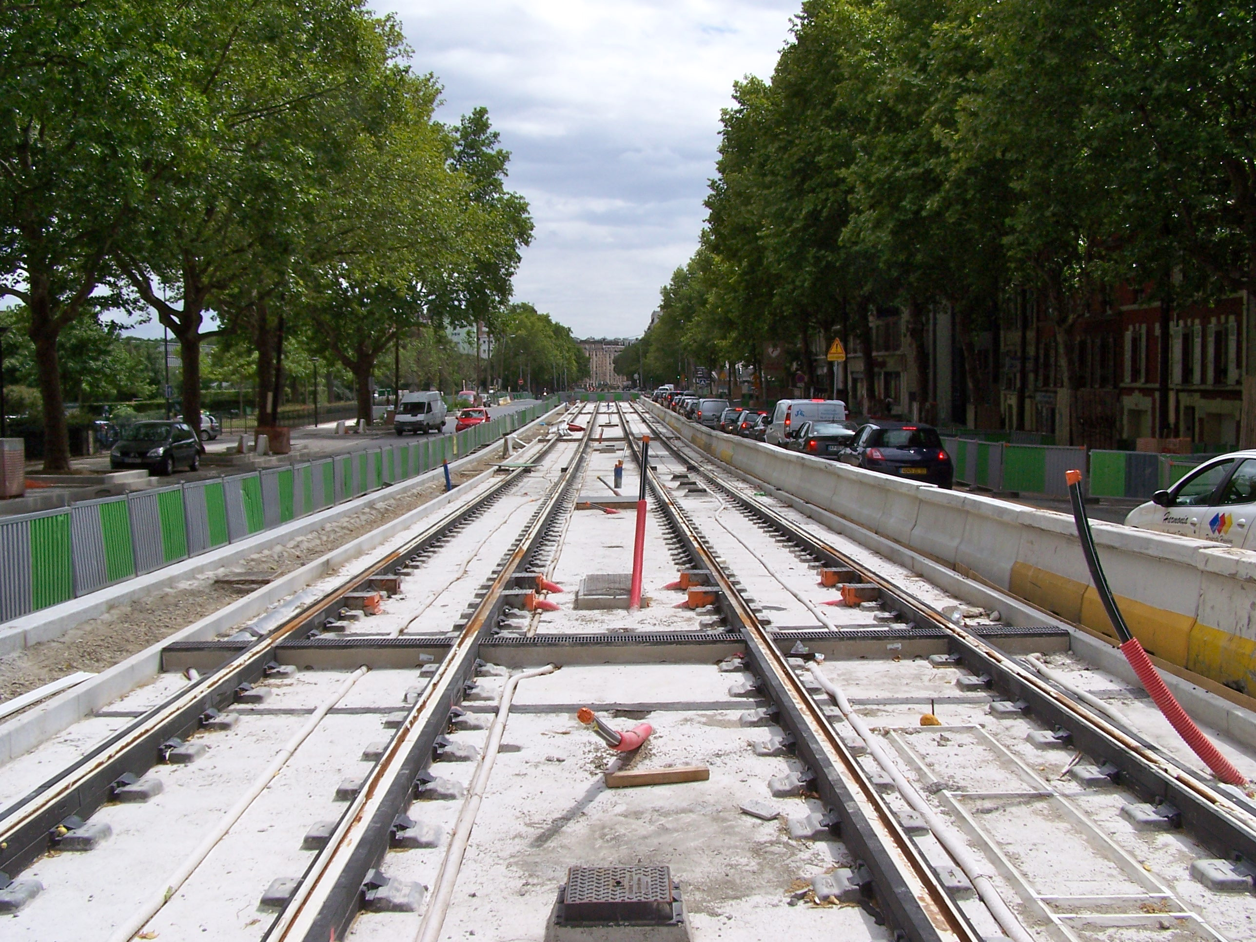 Les travaux de la ligne 3 du tramway d'île-de-France sur le boulevard Soult, vue en direction de la porte de Montempoivre.